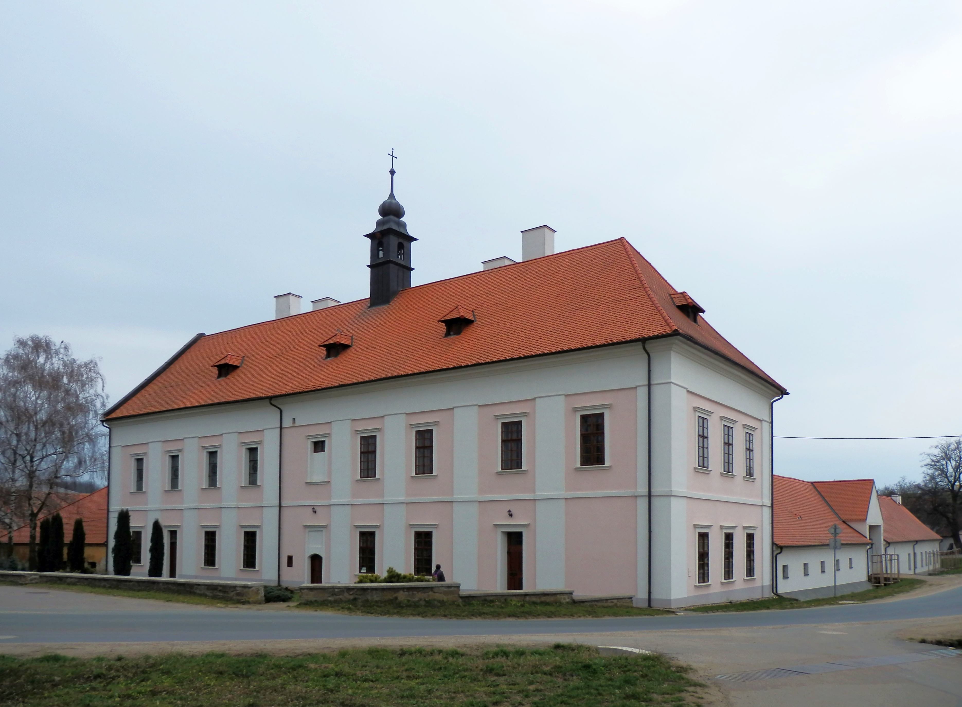 Zámeček Tvořihráz, Tvořihráz 1, v obci, Tvořihráz.